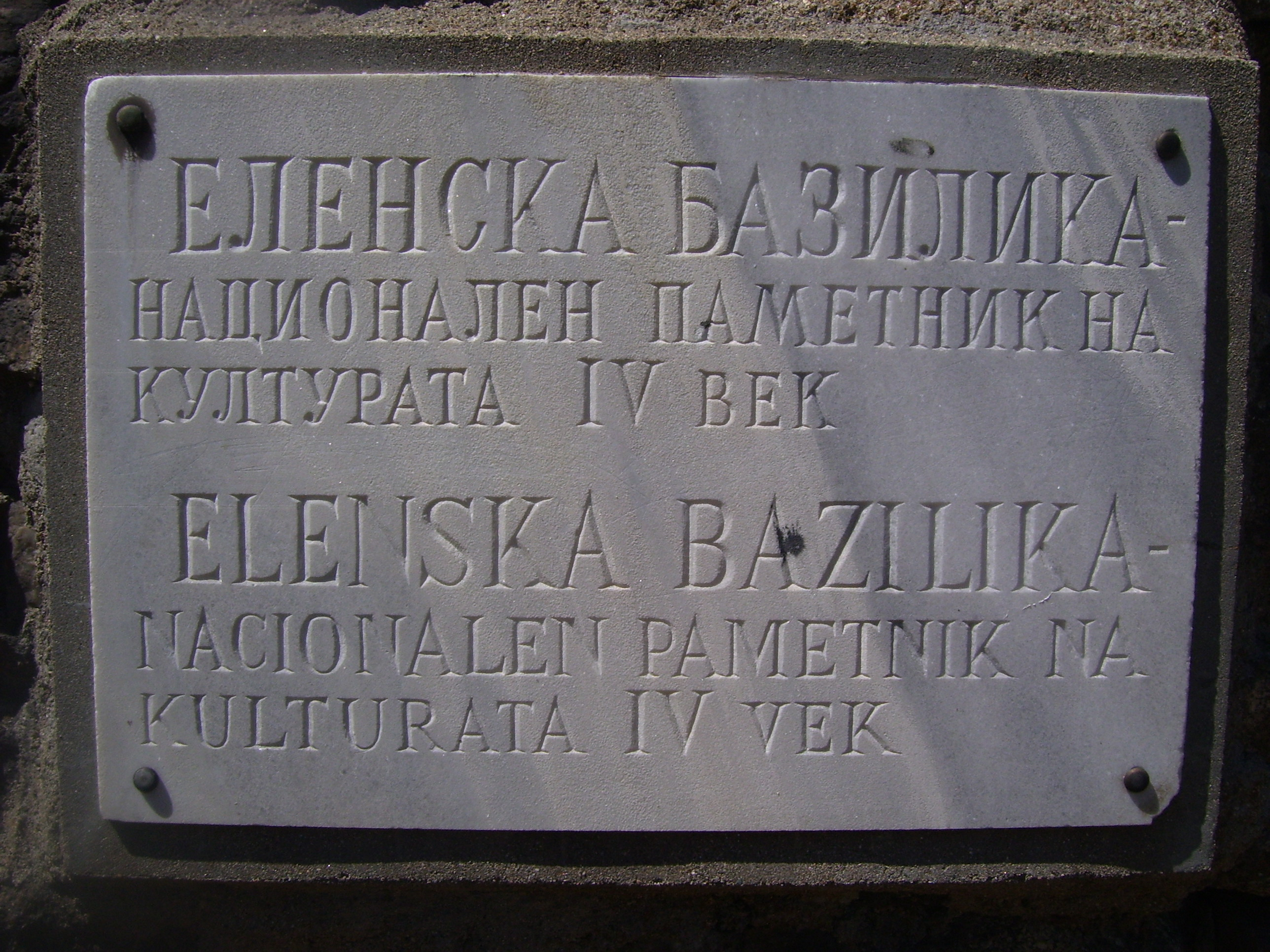 Надпис на Еленската базилика на книжовен български и шльокавица.